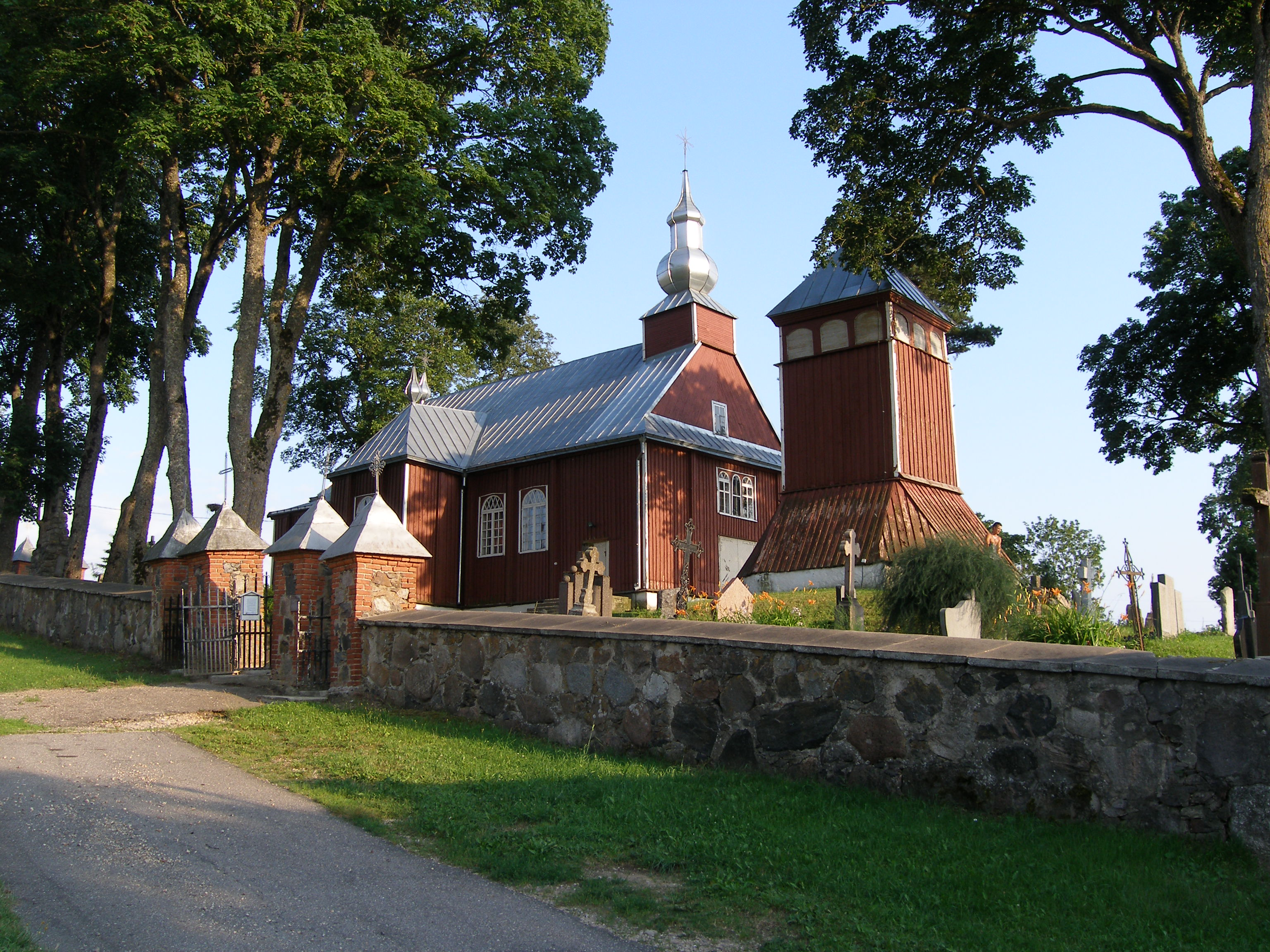 Eigirdžių bažnyčia